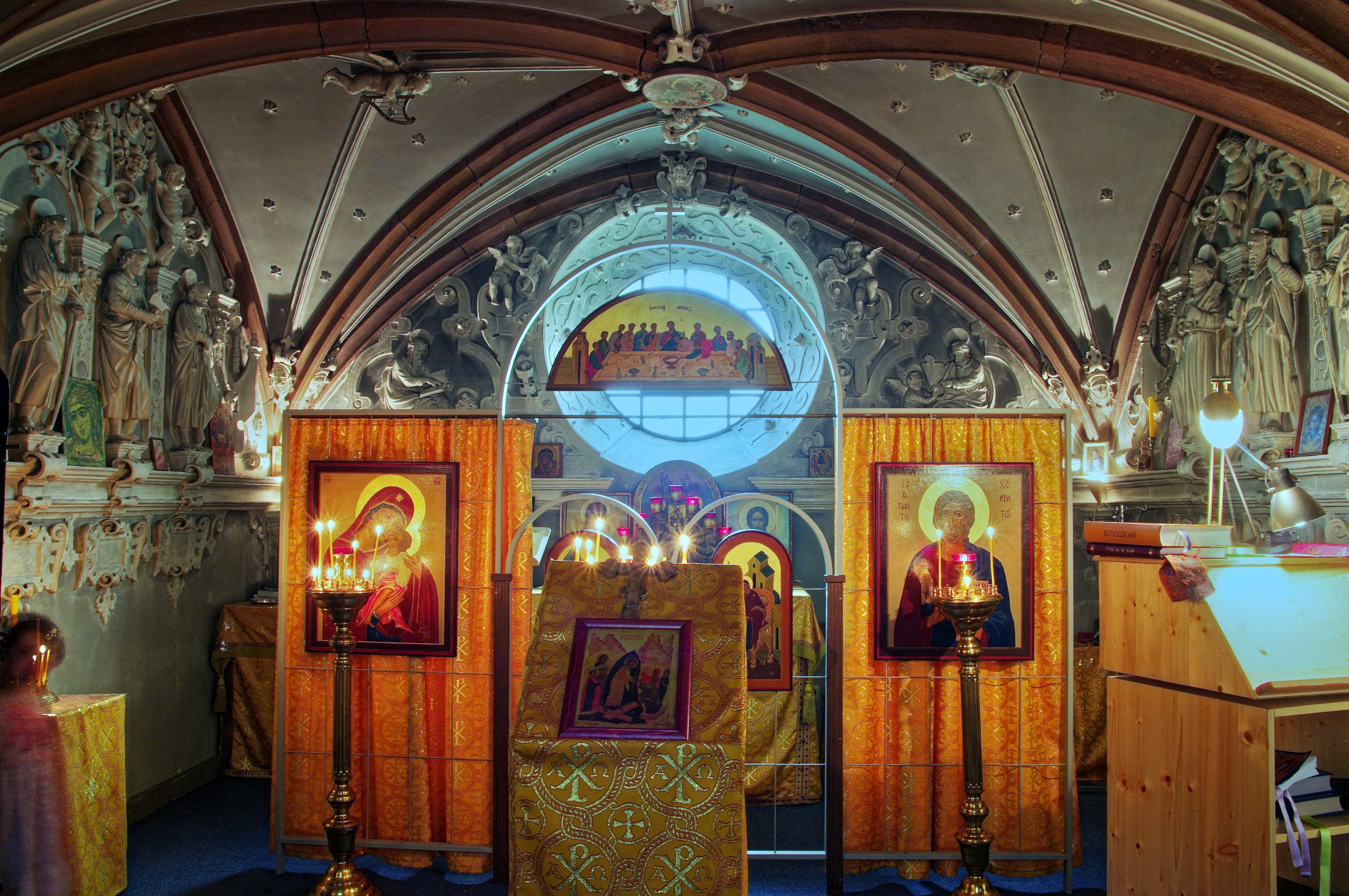 Die Peterhofkapelle wie sie heute genannt wird, hieß früher Heiligkreuzkapelle und stammt aus dem Jahre 1587